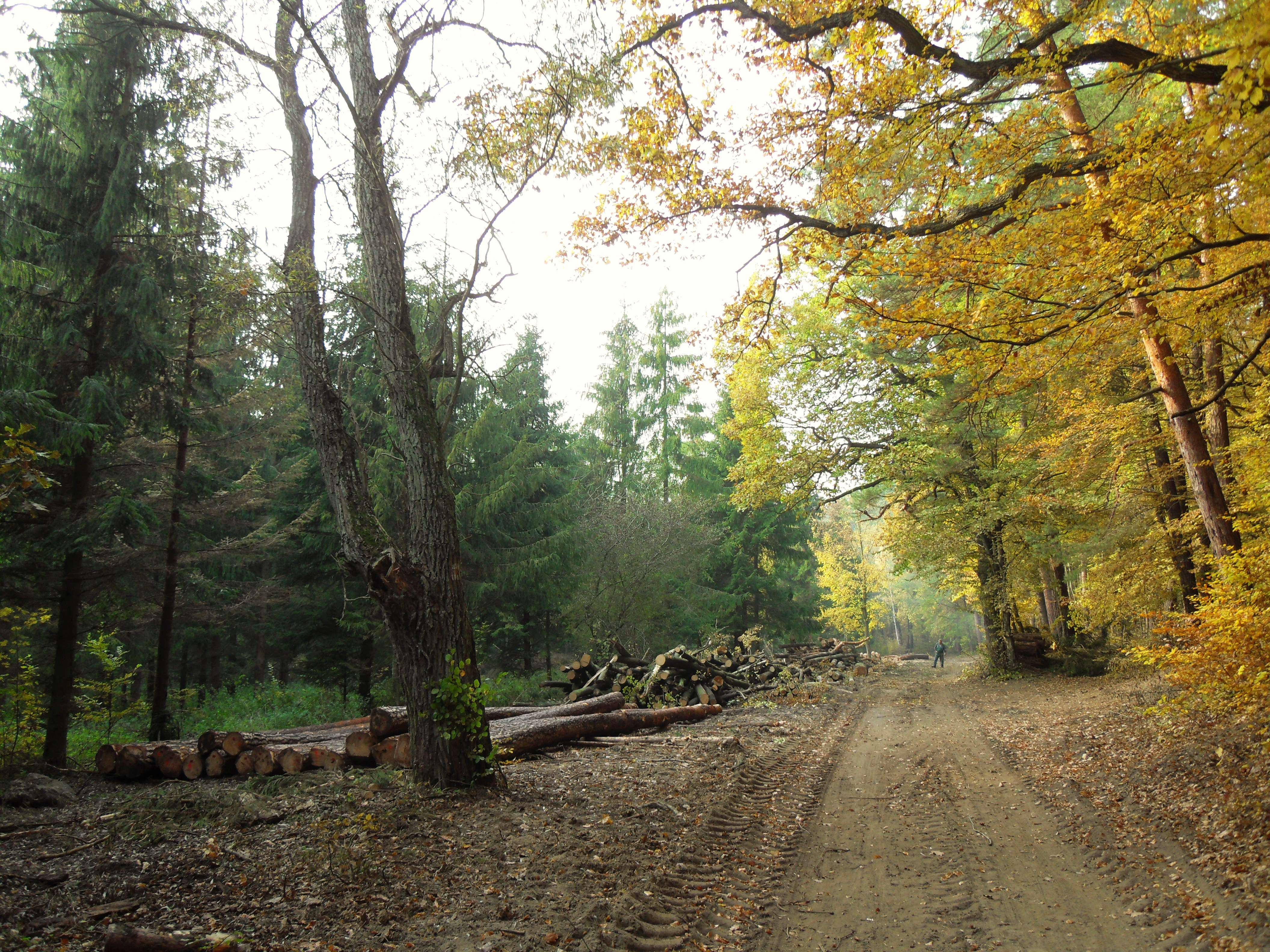 Gdańsk Oliwa, ul. Kościerska w Trójmiejskim Parku Krajobrazowym.